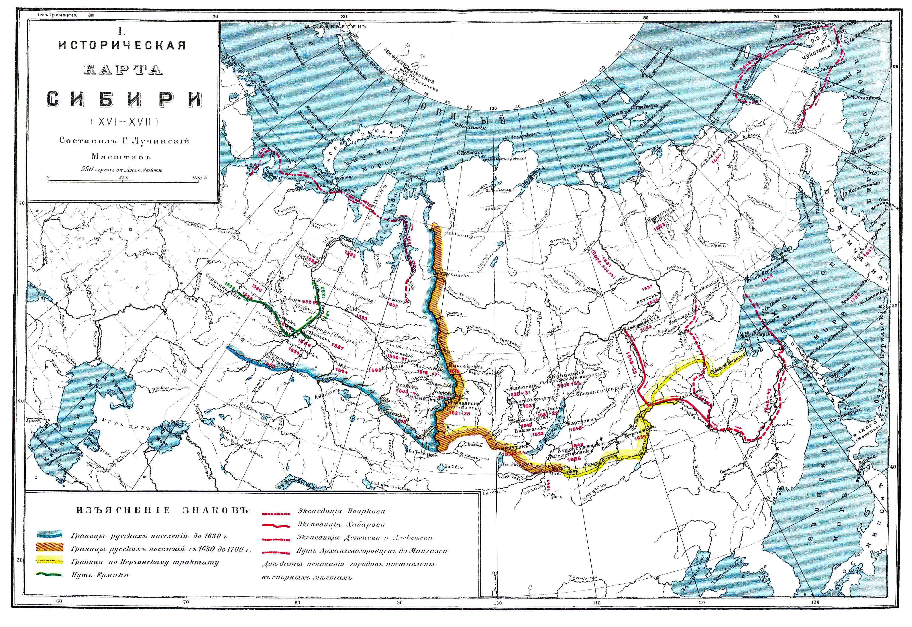 Захоплення Сибіру: Захоплення Сибіру